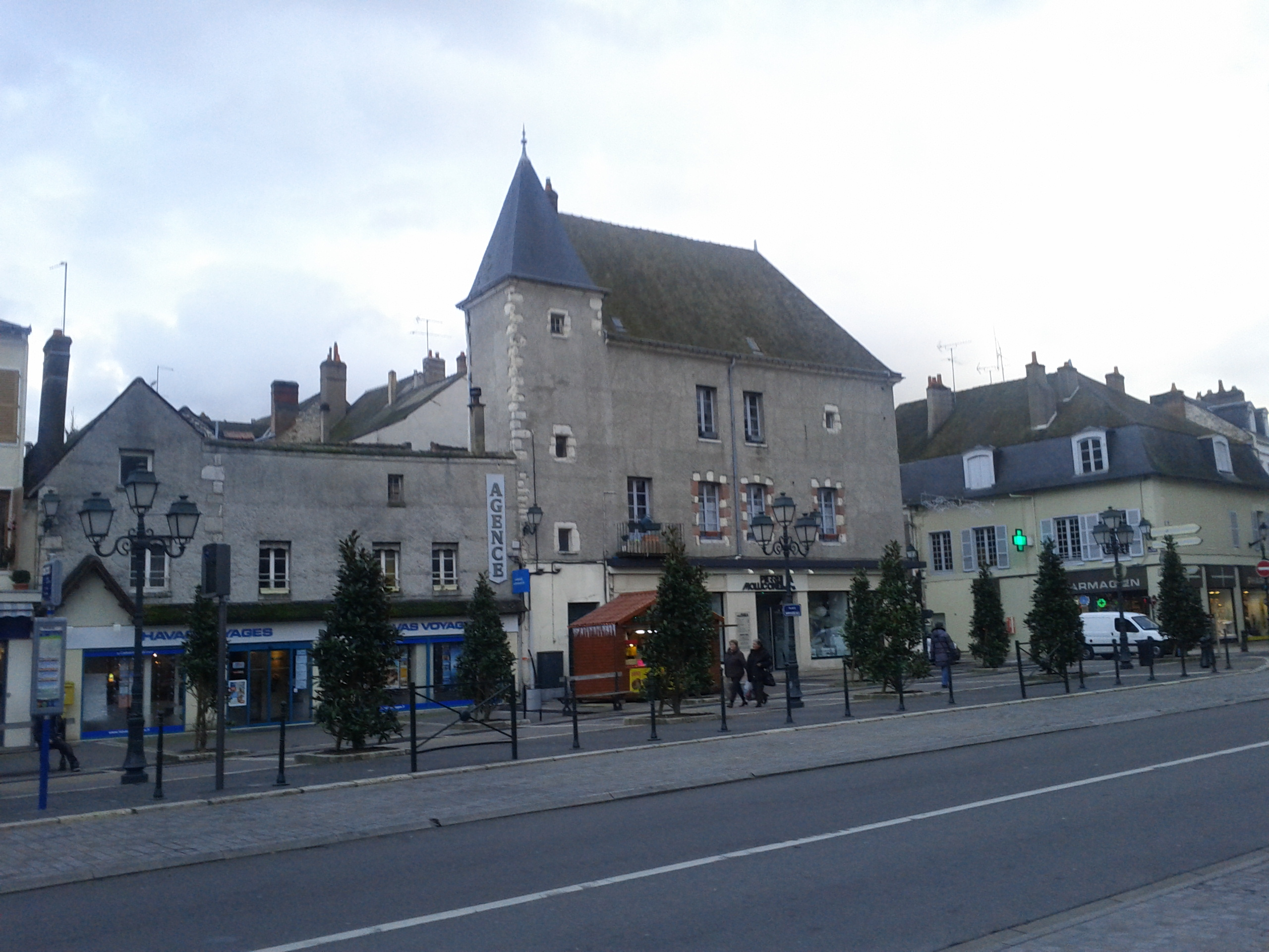 Montargis, France